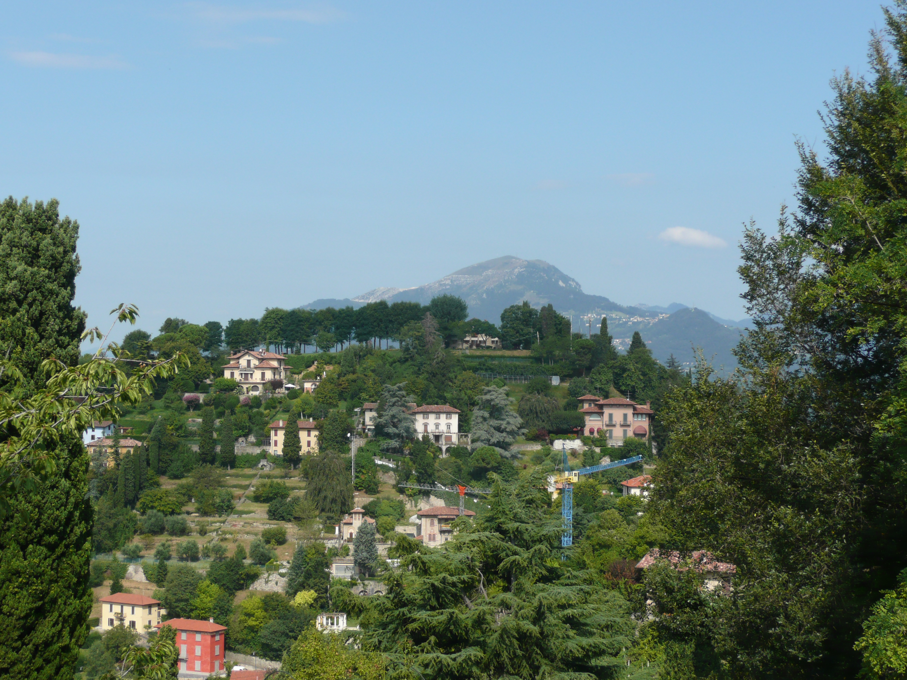 Bergamo